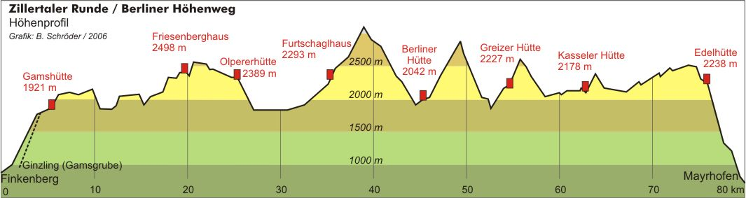 Grafische Darstellung der Höhenunterschiede (Höhenprofil) des Berliner Höhenweges (etwa siebenfach überhöht)